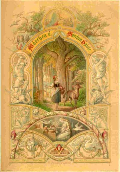 Cover of Mathilde Wesendonck: Märchen u. Märchen Spiele (Düsseldorf, 1864)